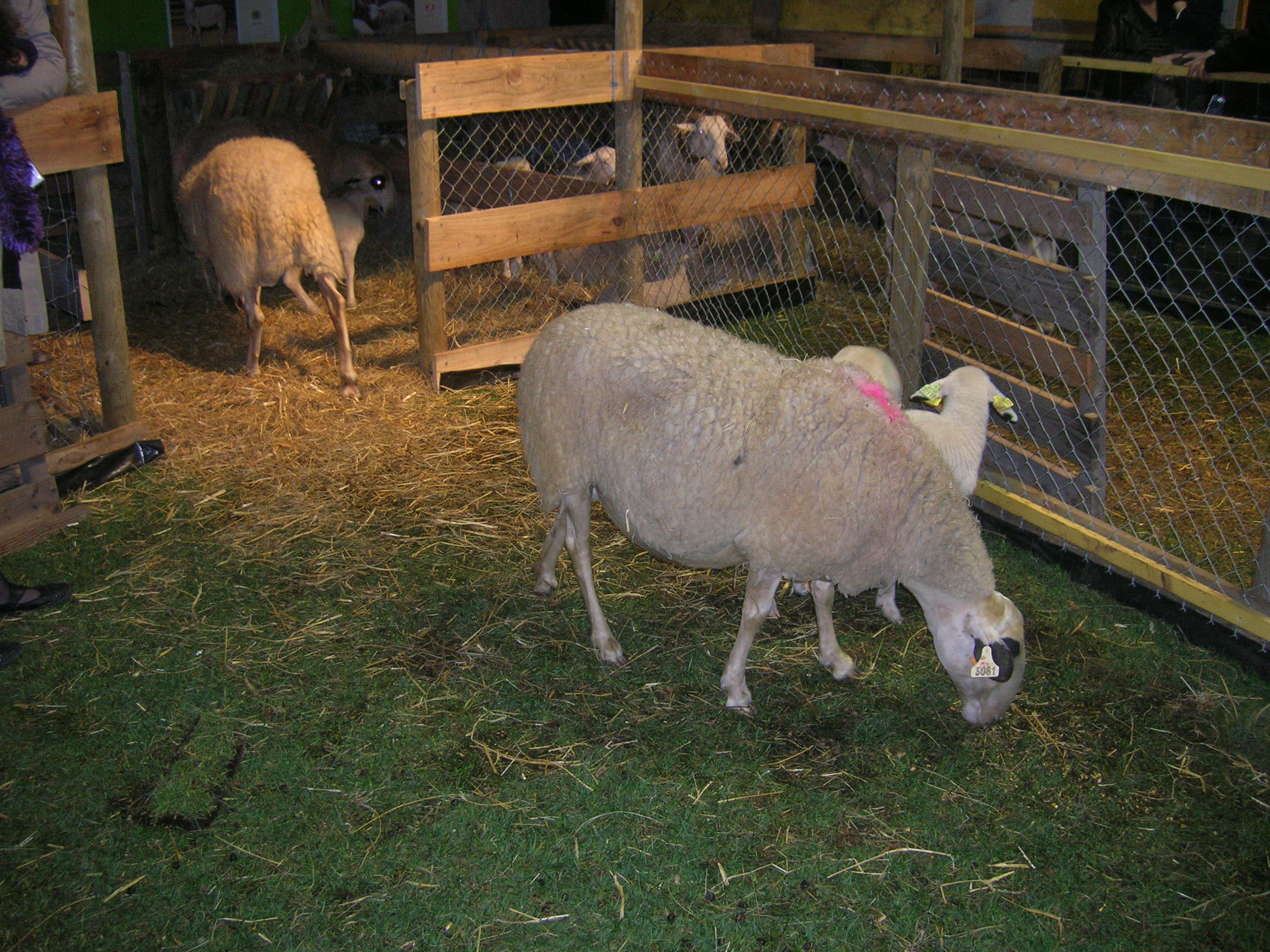 Brebis de race Causse du Lot au salon SISQA de Toulouse. (salon agroalimentaire et agricole)